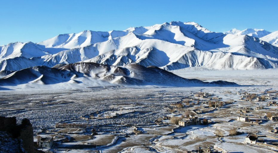 Nyoma